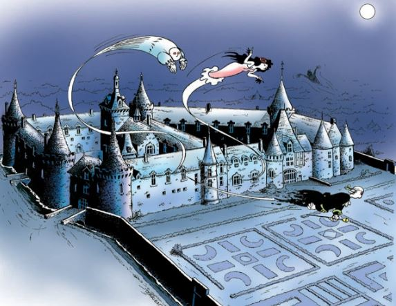 plan du premier château réalisé par Jean-Pierre Terrie (La forteresse Renaissance de Cheverny - voir la note 5 sous le renvoi a1)